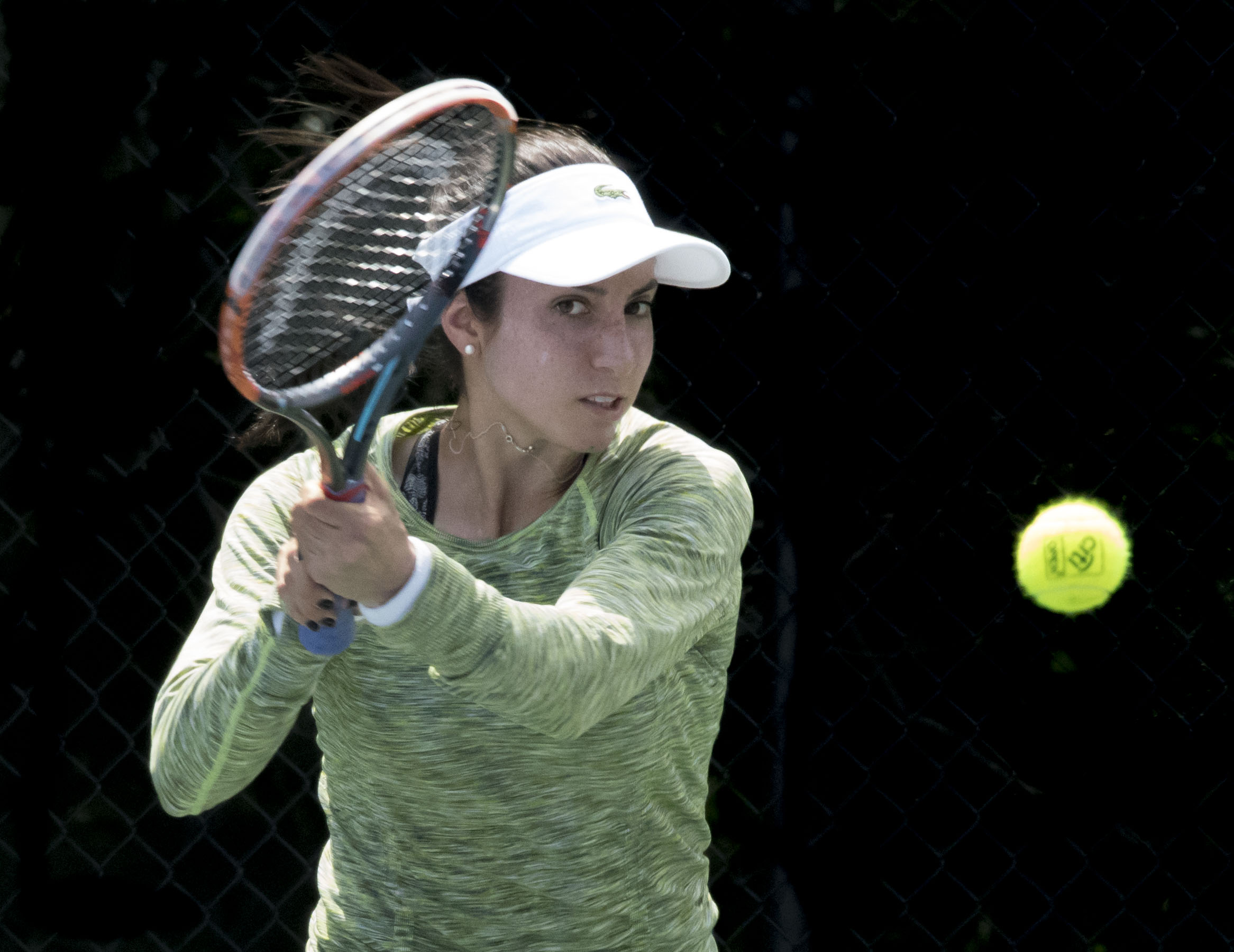 2016 Citi Open